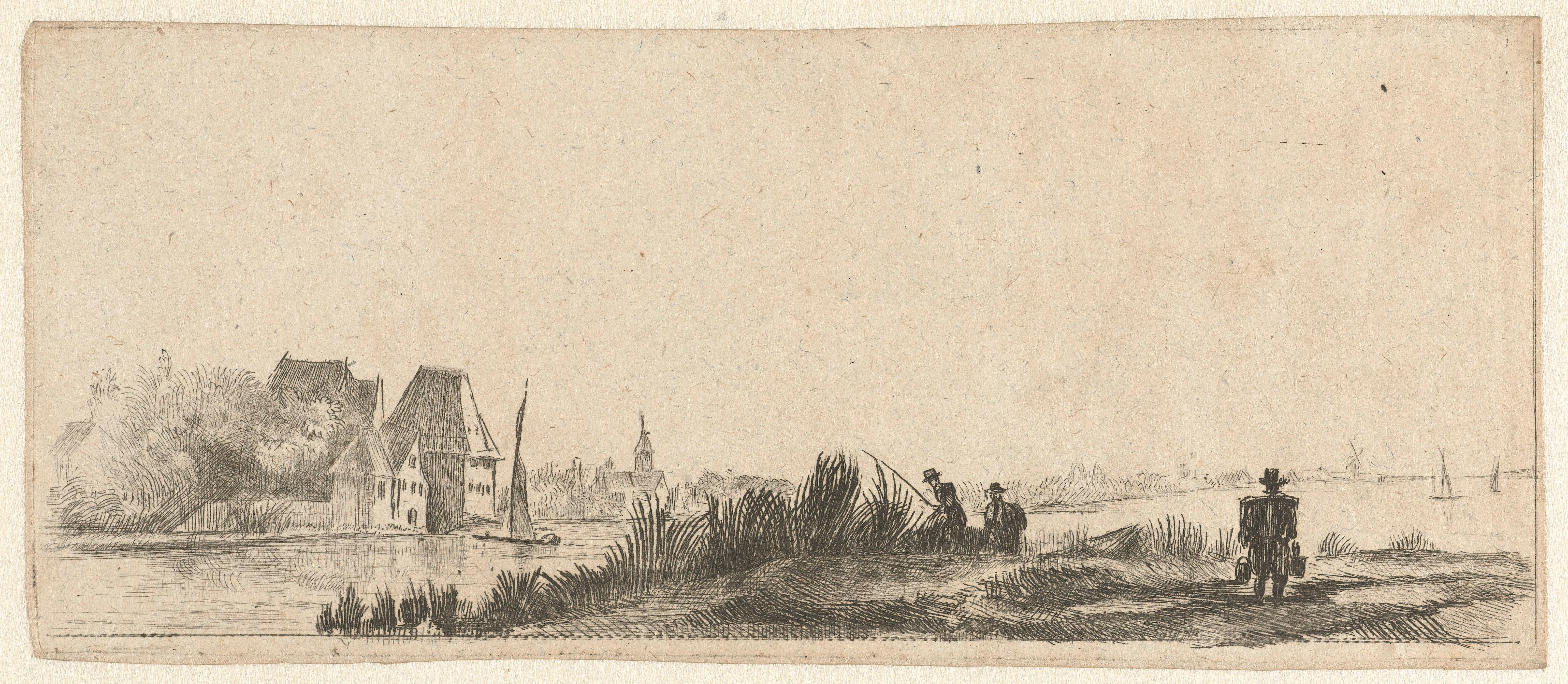 IdentificatieTitel(s): Landschap met hengelaars en melkboerObjecttype: prent Objectnummer: RP-P-1957-454Catalogusreferentie: Hollstein Dutch 8-copyOpschriften / Merken: verzamelaarsmerk, verso, gestempeld: Lugt 2228verzamelaarsmerk, verso, gestempeld: Lugt 2760VervaardigingVervaardiger: prentmaker: Claude Henri Watelet (mogelijk)naar prent van: Pieter de WithDatering: 1728 - 1786Materiaal: papier Techniek: etsenAfmetingen: plaatrand: h 72 mm × b 175 mmToelichtingPrent voor het eerst gebruikt in: Recueil de Quatre-Vingt-Cinq estampes originales, têtes, paysages et différens sujets, dessinées et gravées par Rembrandt. Parijs: Henry Louis Basan, 1819.OnderwerpWat: landschappenVerwerving en rechtenCredit line: Aankoop uit het F.G. Waller-FondsVerwerving: aankoop 1957Copyright: Publiek domein